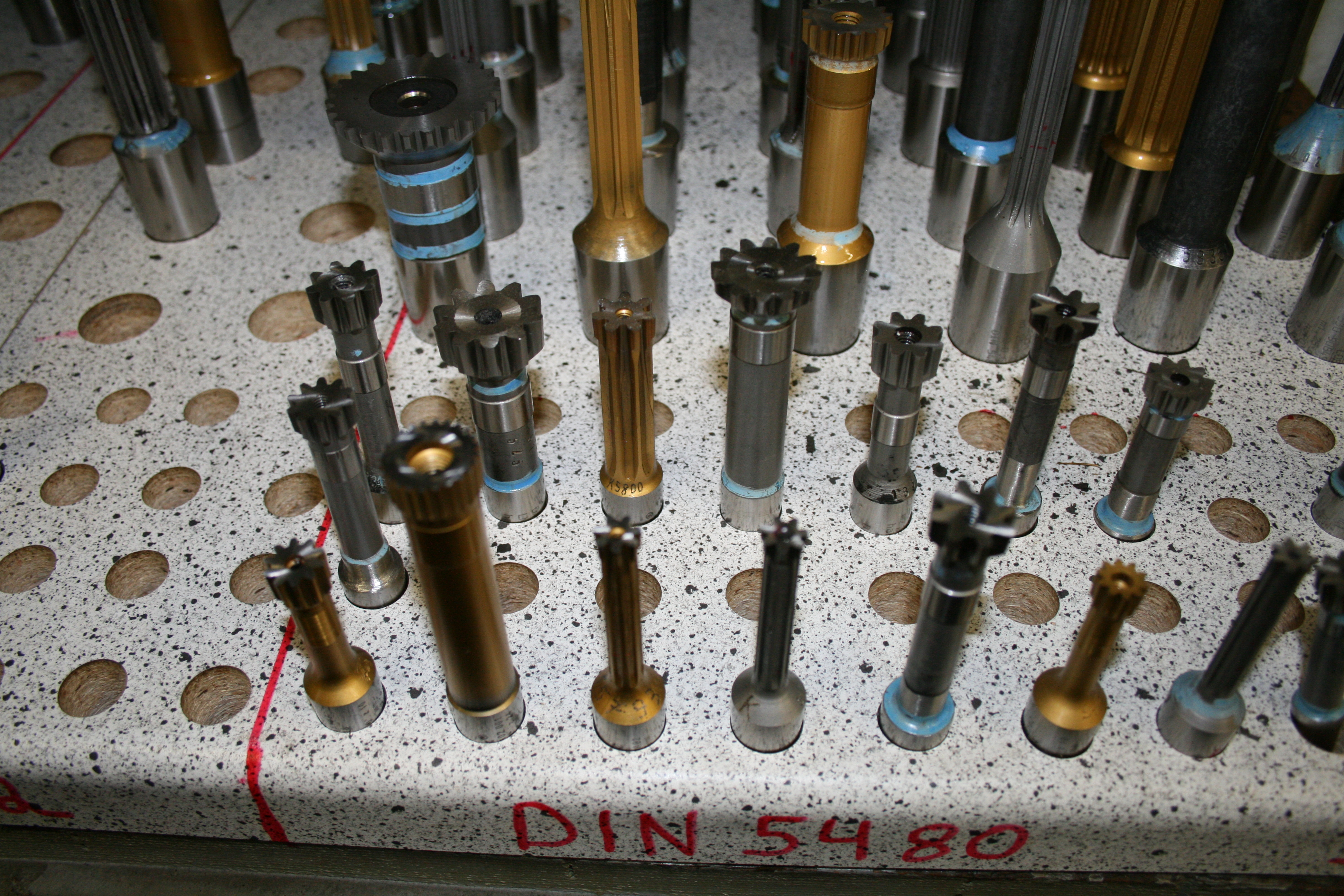 Längere Schaftstosswerkzeuge